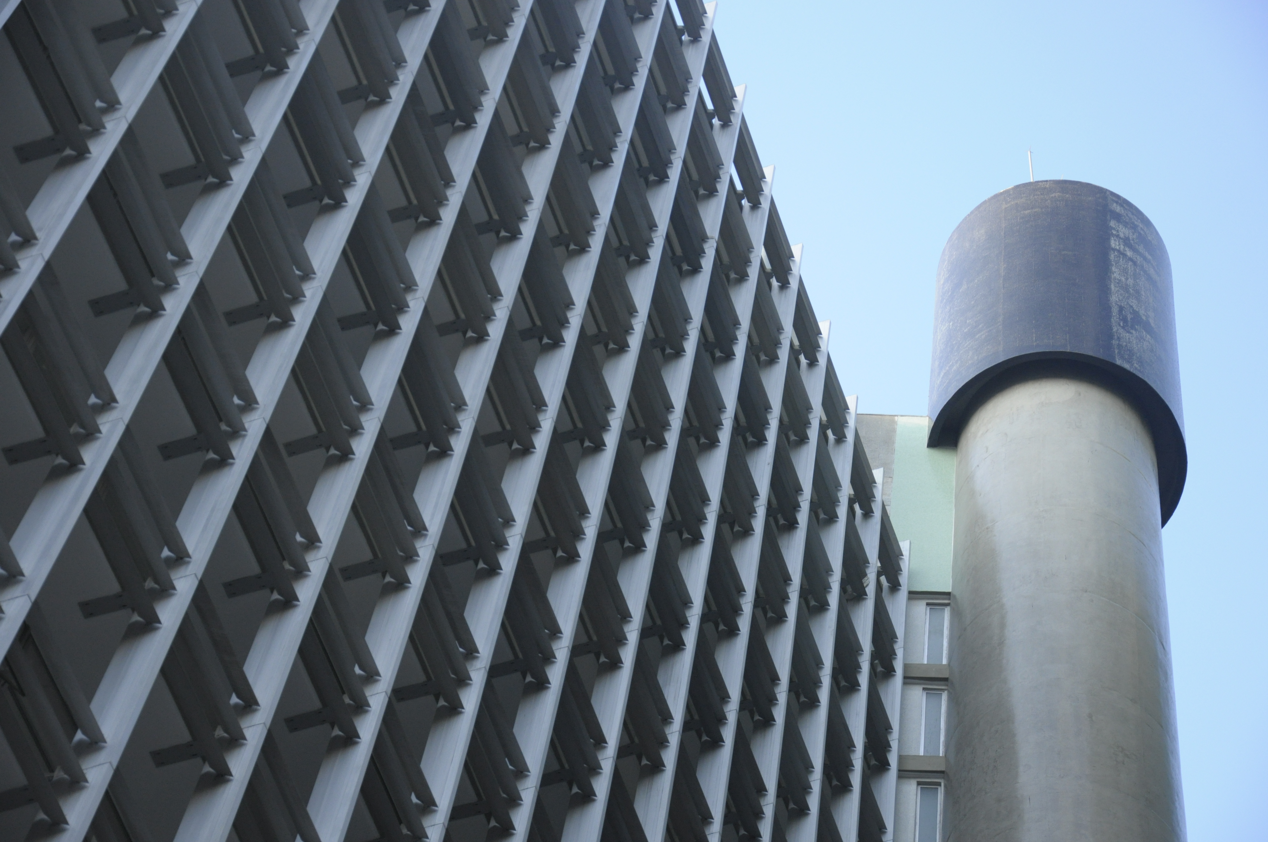 Topo do Edifício Banco Sul Americano - São Paulo (SP), Brasil, visto de frente na Avenida Paulista.